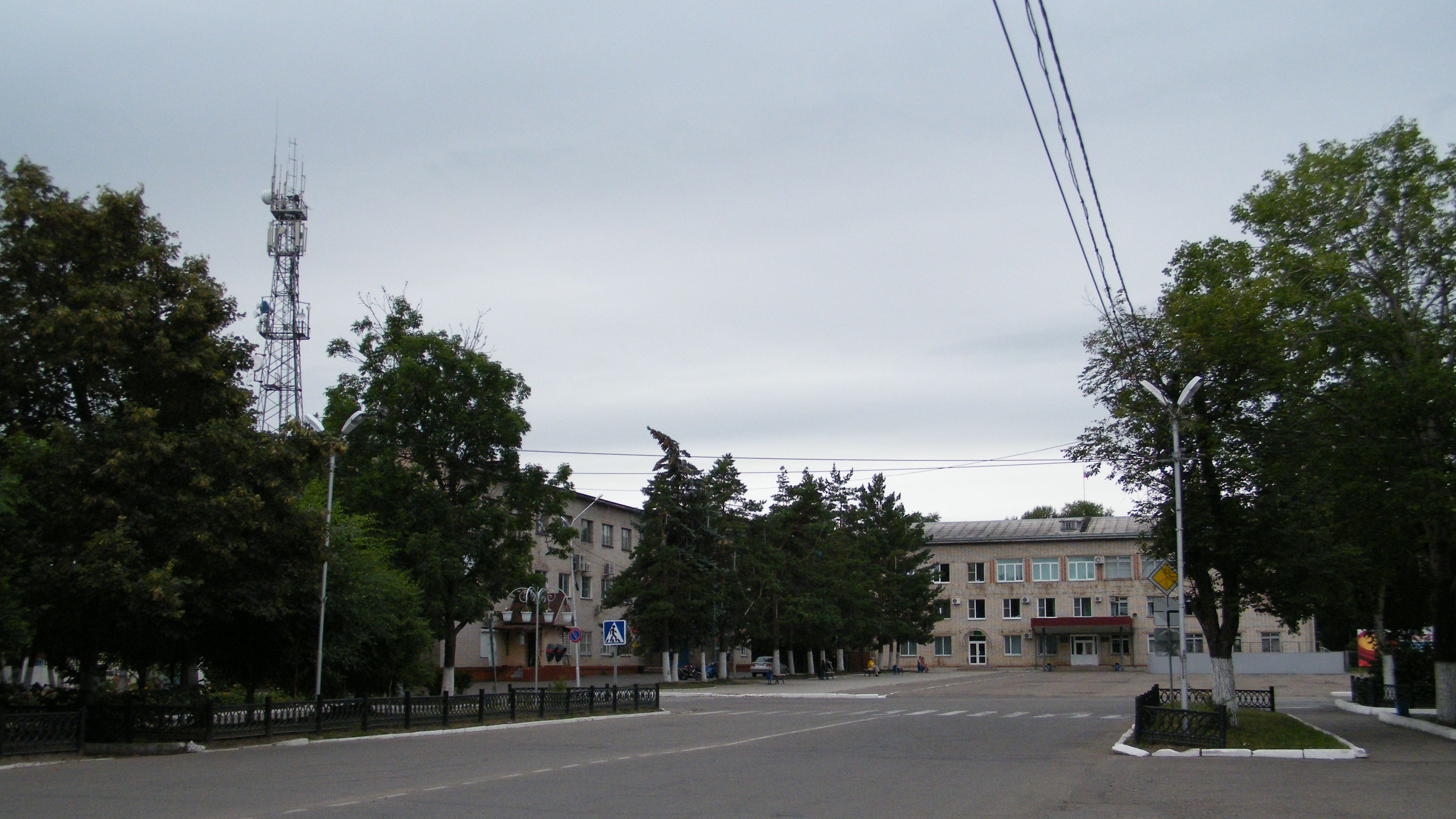 Дальнереченск, здание администрации